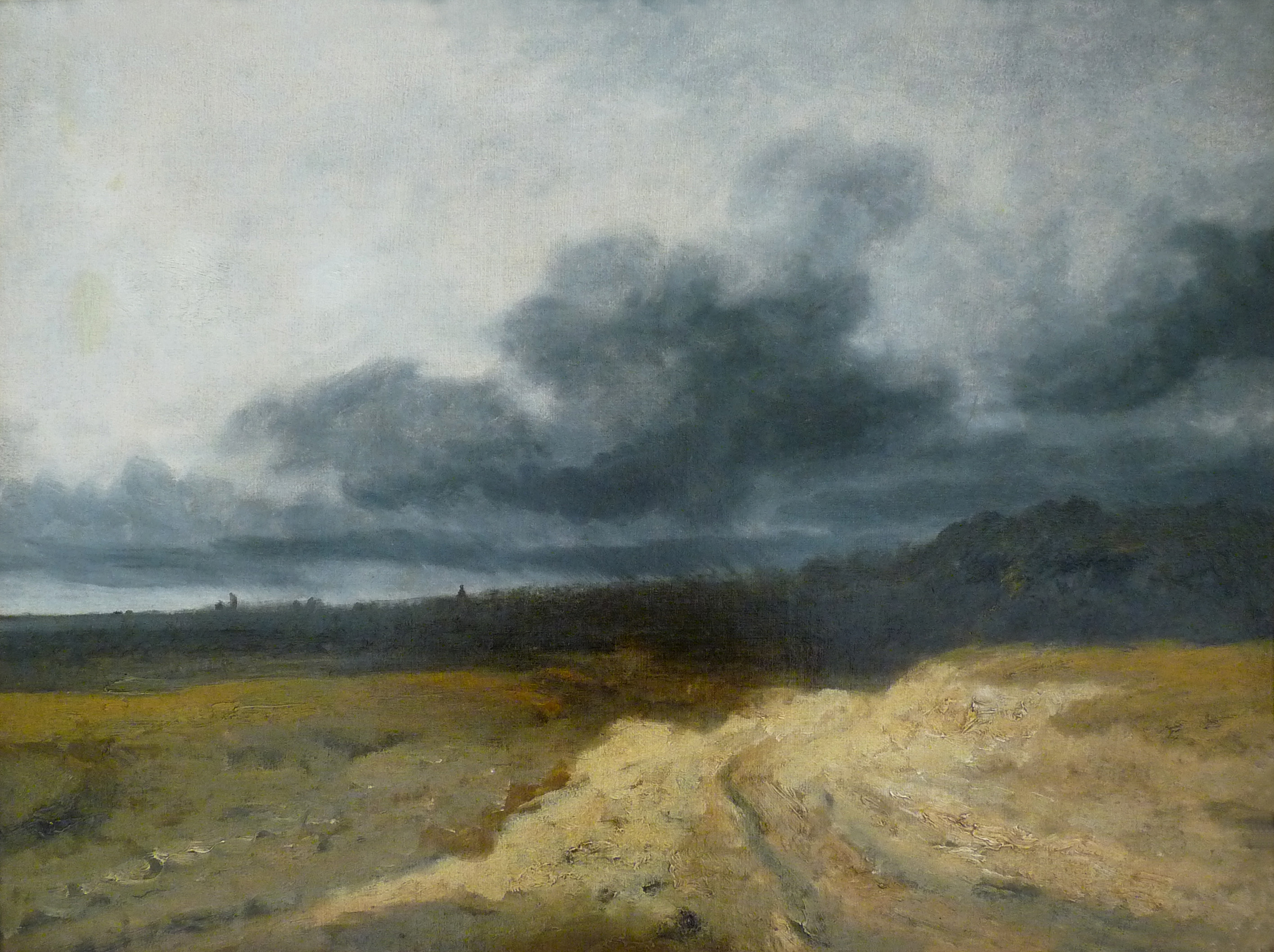 Georges Michel, L'orage, huile sur toile, date ?, Musée des beaux-arts de Strasbourg.